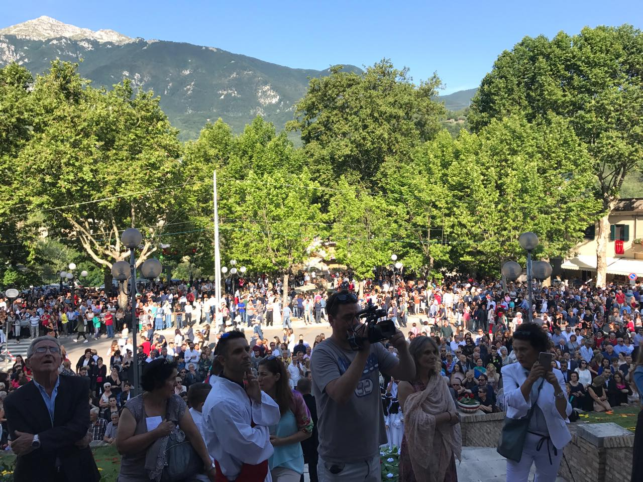 La folla durante la festa di San Giovanni Battista